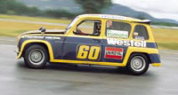 El R4 en cuestión producía 130 caballos de potencia y una velocidad máxima de 207 km/h, desarrollado y preparado en Colombia por Peter Goldring.